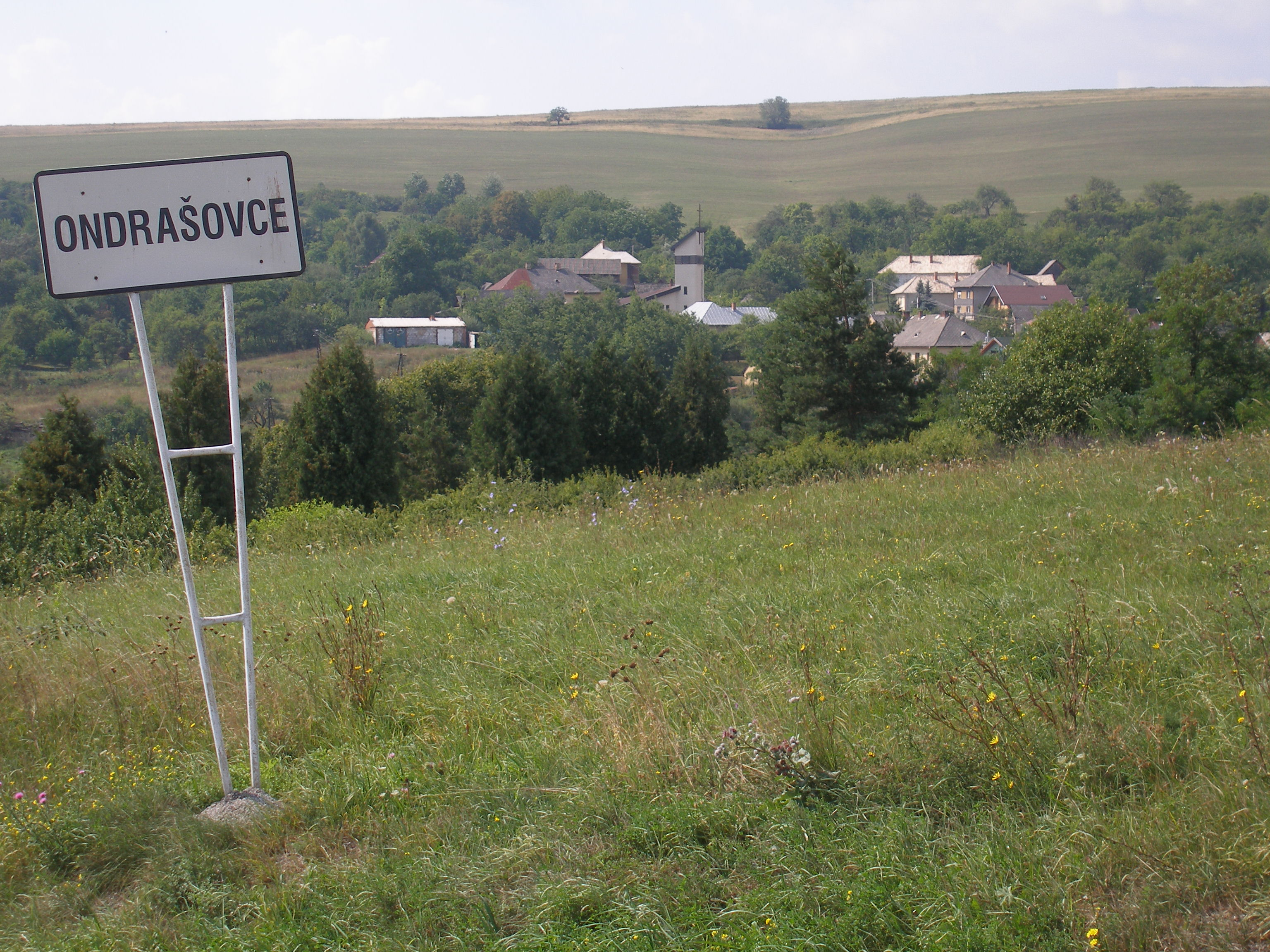 Šarišská obec Ondrašovce